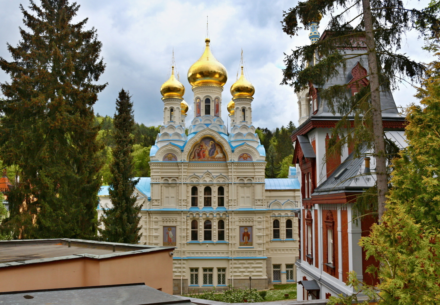 Pravoslavný chrám svatých Petra a Pavla v Karlových Varech